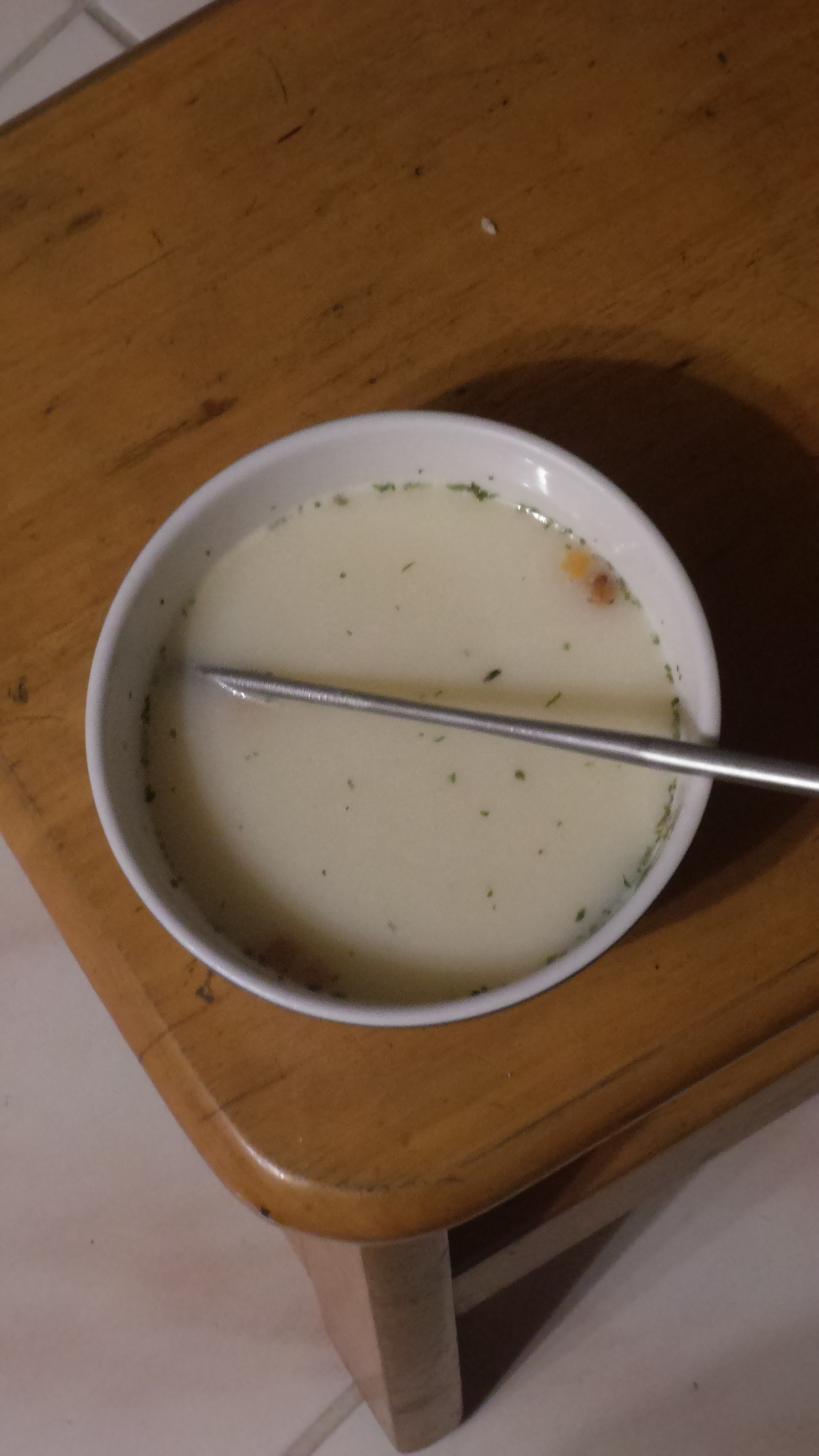 採用卡爾貝爾起司巧達起司戈爾根佐拉起司vono巧達濃湯 再跟我說你妹的版權啊版你妹